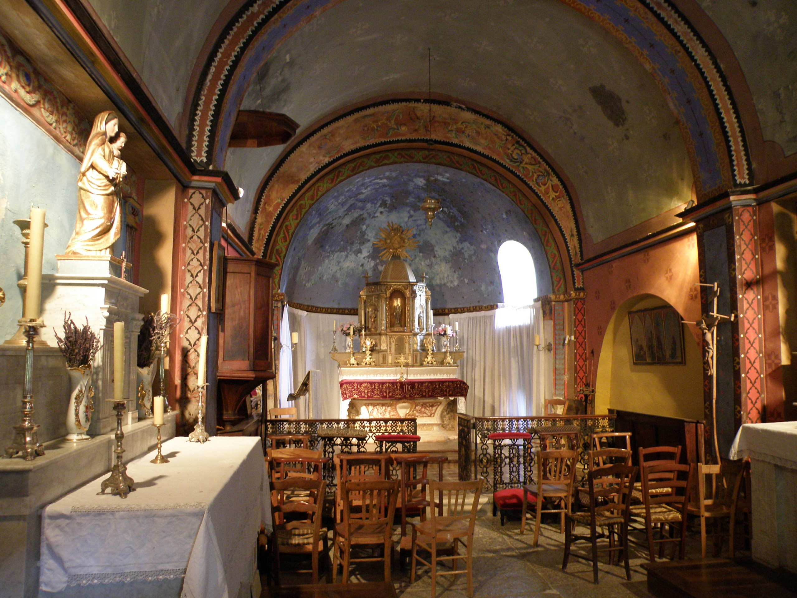 Aulan (Drôme, France). Église Saint-Jacques.